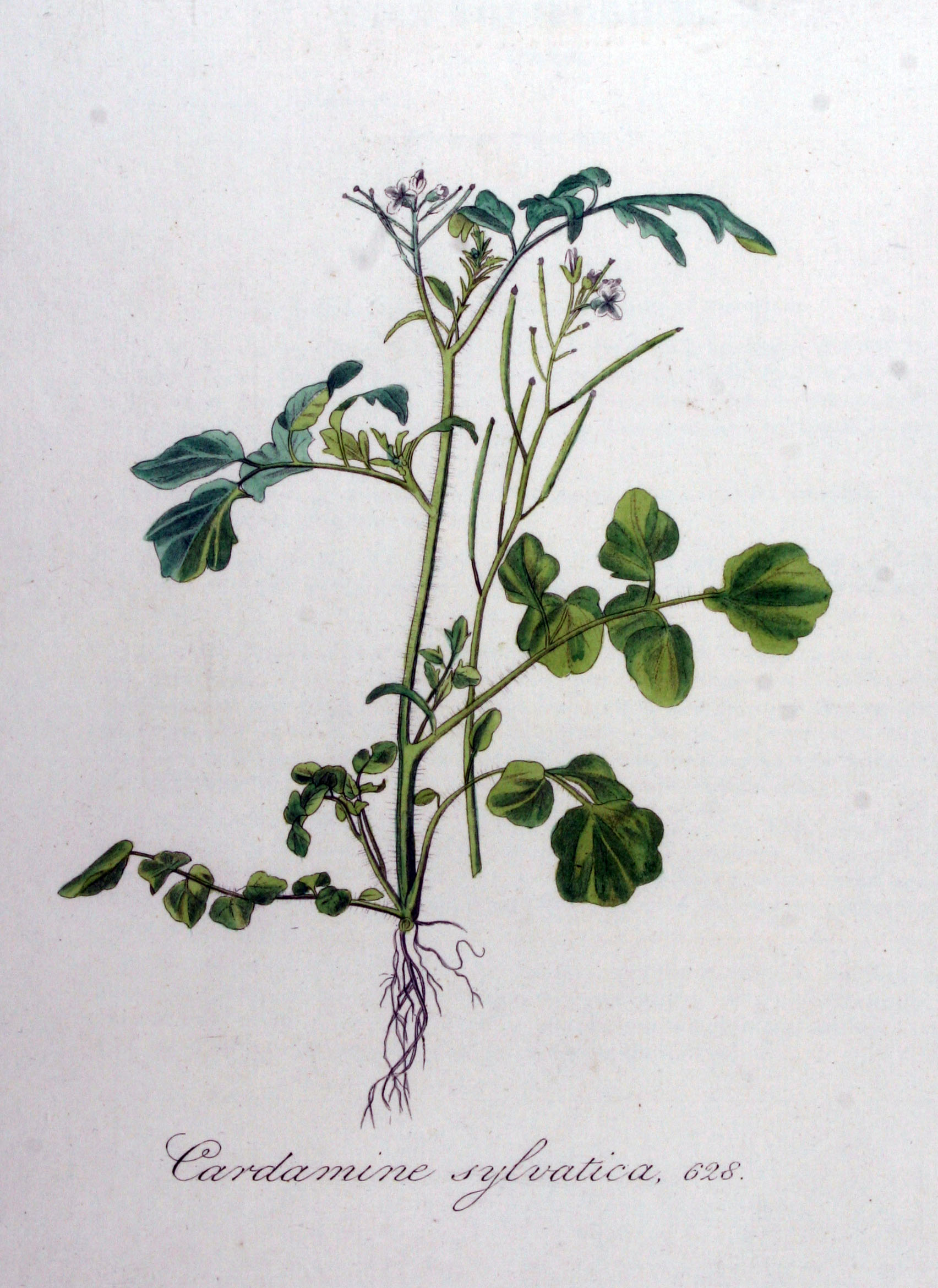 Cardamine flexuosa With. (Syn. Cardamine sylvatica Link)